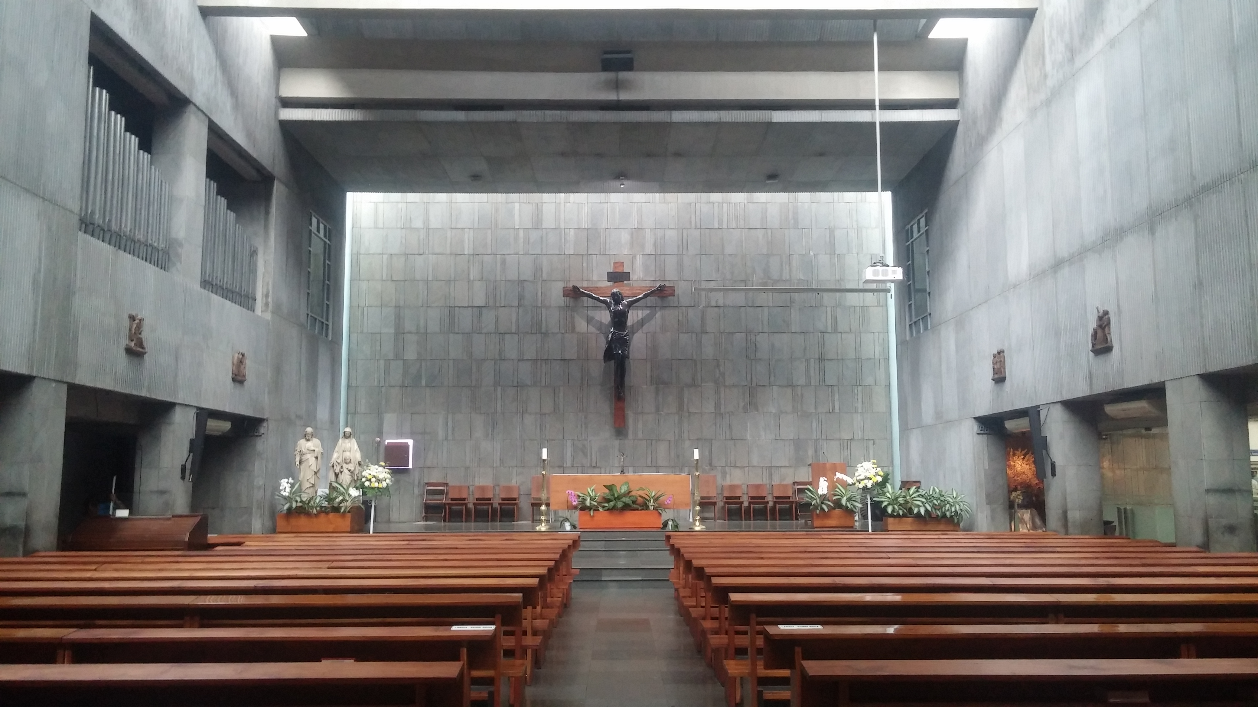 Gereja Santa Gereja SPMR Blok Q Gereja Santa Perawan Maria Ratu Paroki Blok Q